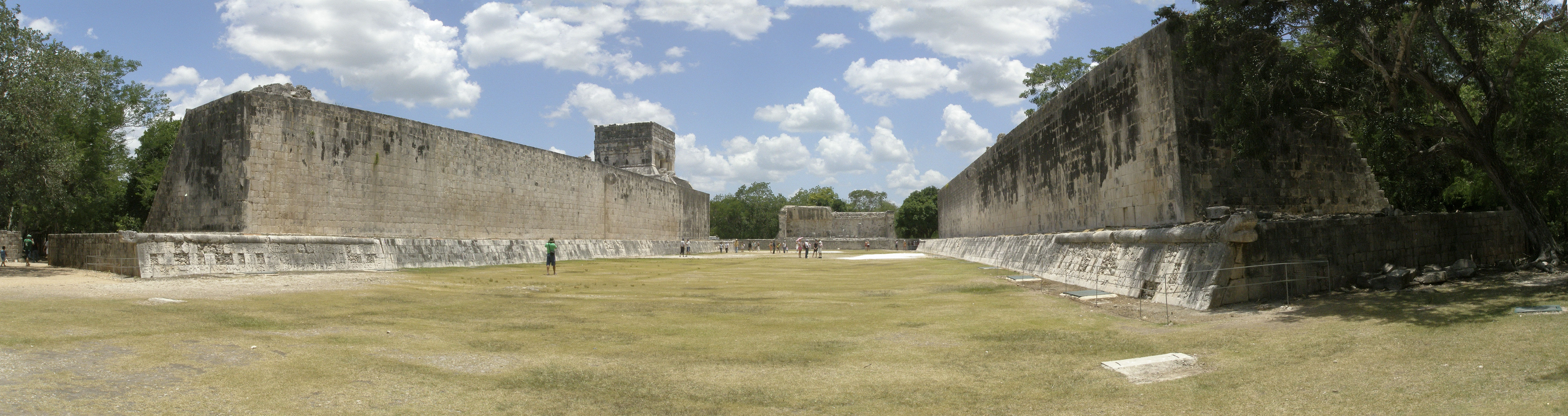 Panorámica del «Juego de Pelota» de Chiché´n Itzá, Quintana Roo, México.